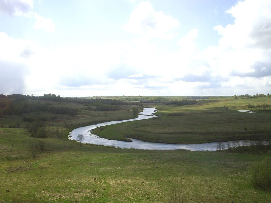 река Сить на территории Некоузского района Ярославской области